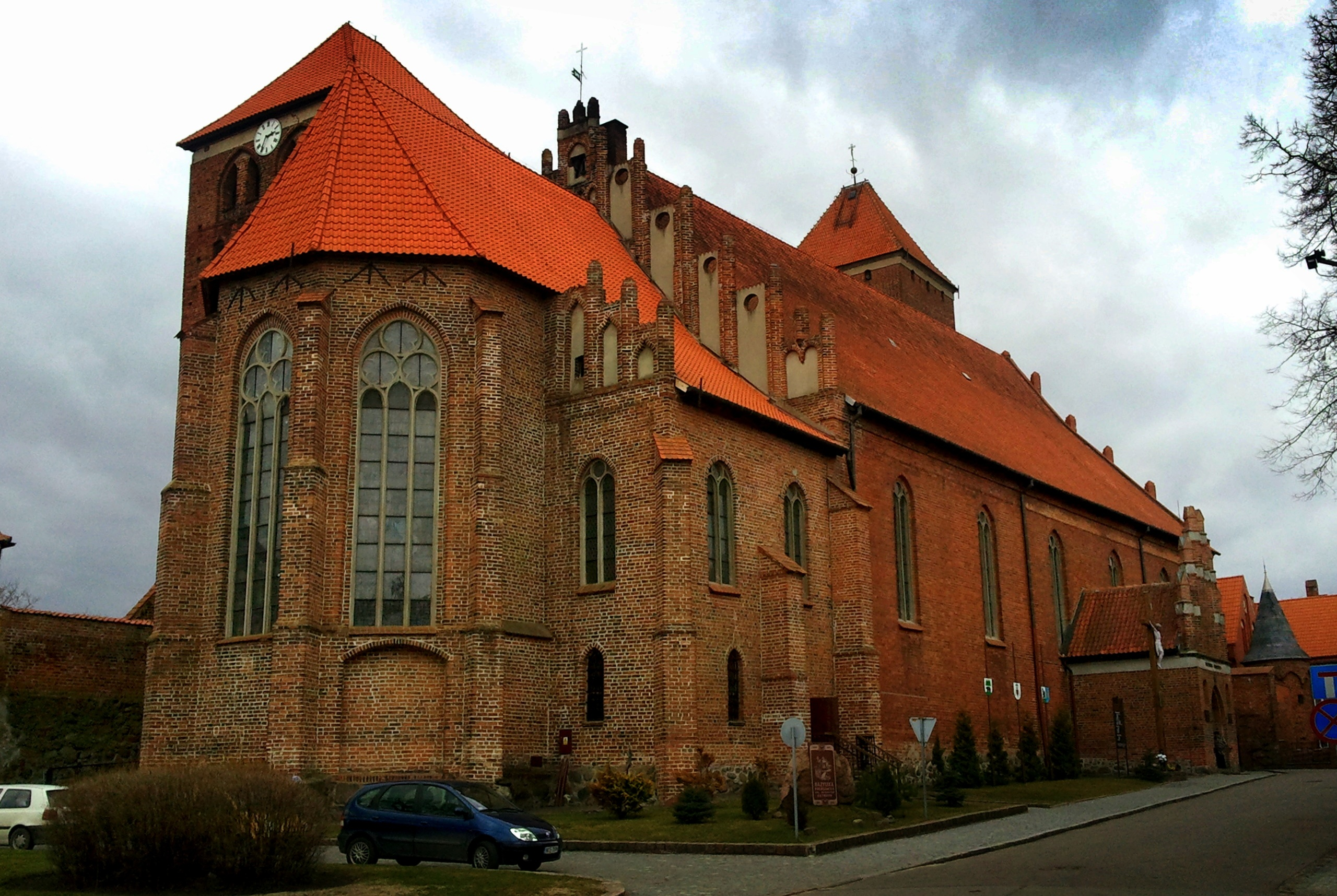 Ketrzyn, Poland